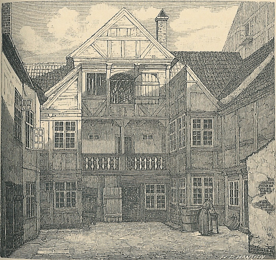 Den Collinske gård i Bredgade i København (Bredgade 4). Her boede familien Collin, med faderen Jonas Collin og sønnen Edvard Collin, som begge optrådte som mæcener for datidens kunstnere såsom H.C. Andersen.